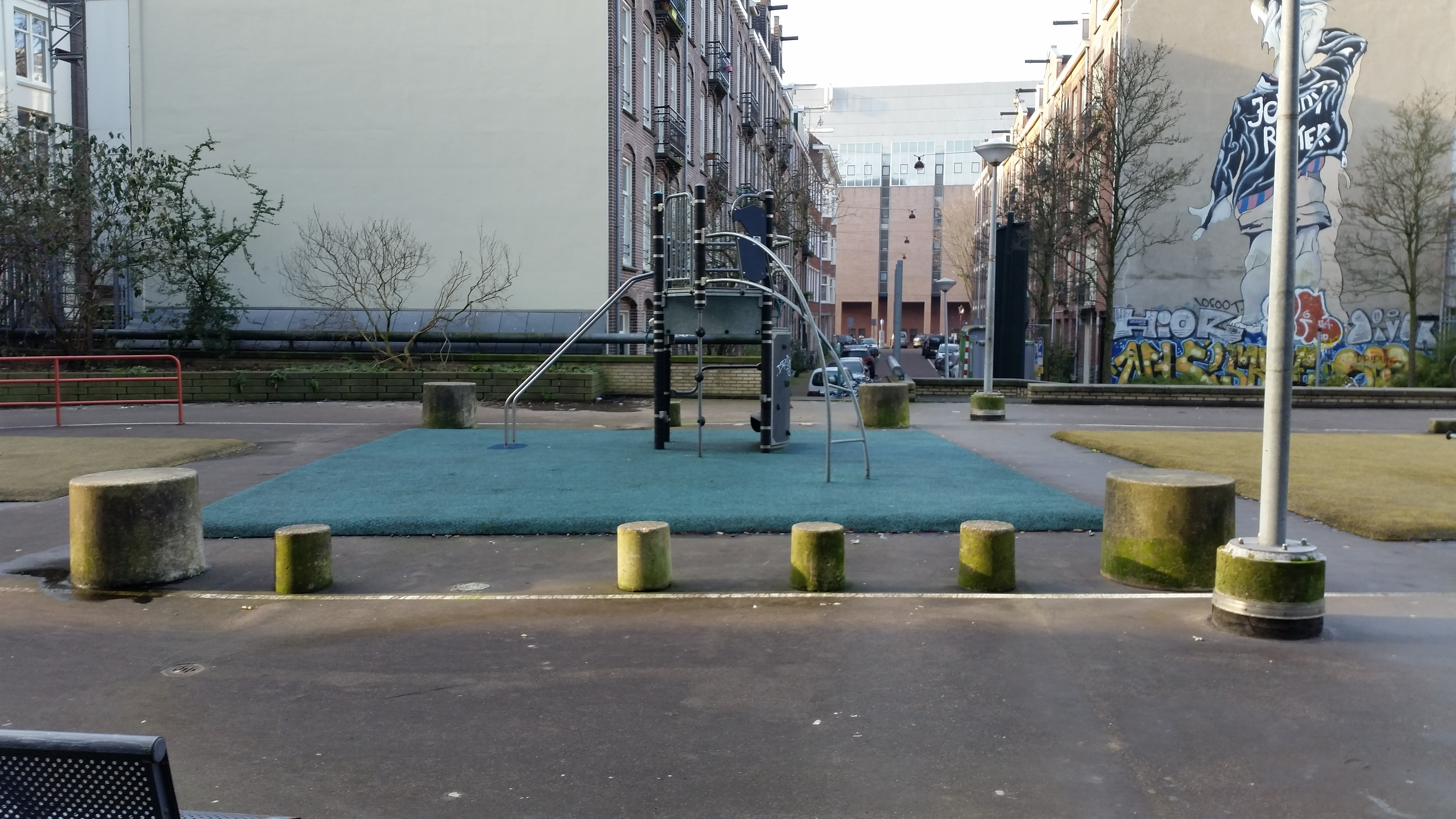 Impressie van de Lepelstraat, Amsterdam-Centrum in 2020